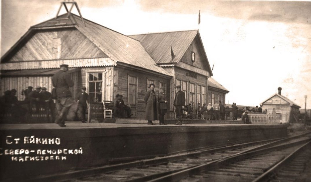 Станция Айкино.